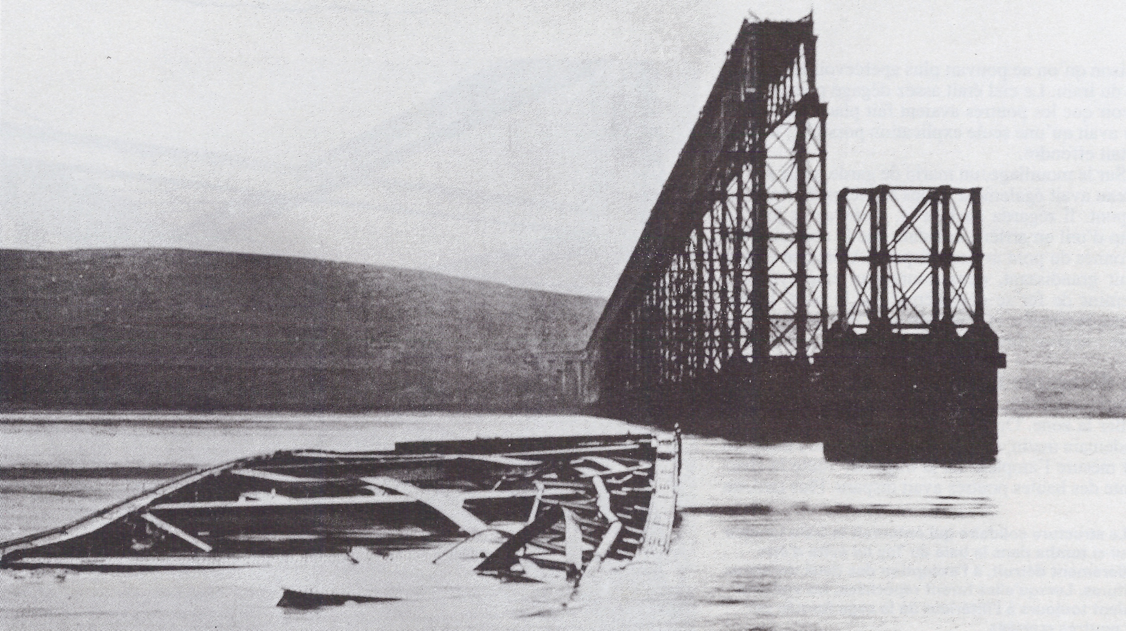 Catastrophe ferroviaire du pont sur le Tay en Écosse, le 28 décembre 1879 / Photo des poutres du pont tombées dans le fleuve